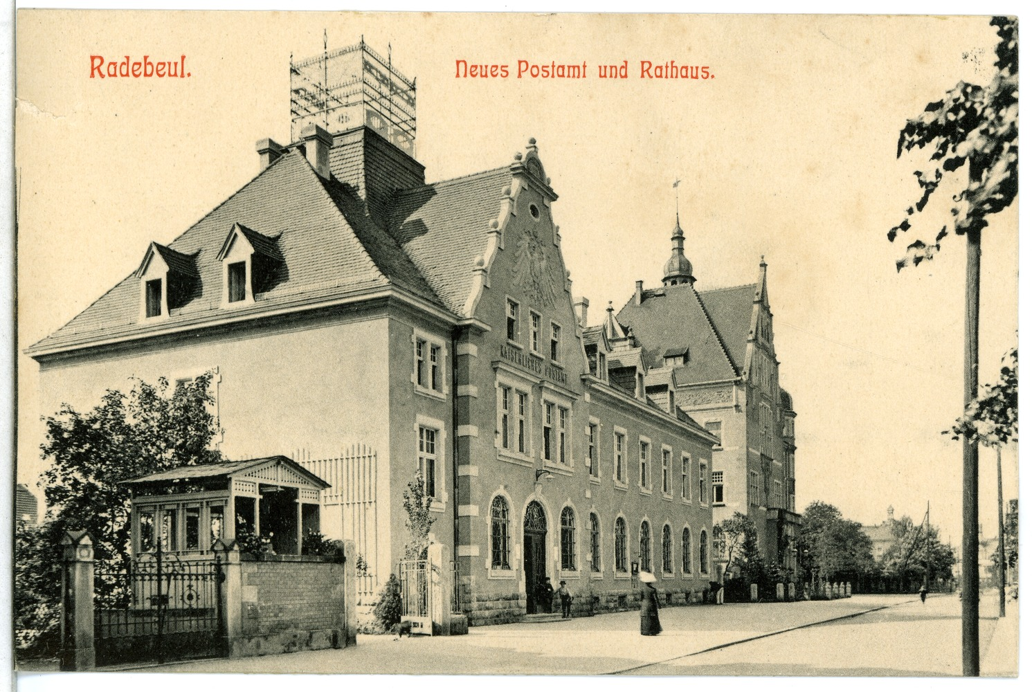 Radebeul; Neues Postamt und Rathaus This postcard is from publisher Brück & Sohn in Meißen ( postcard has a unique number 12695 and is available in a higher resolution at the publisher. This images was uploaded in a cooperation project between Wikipedians and the publisher.